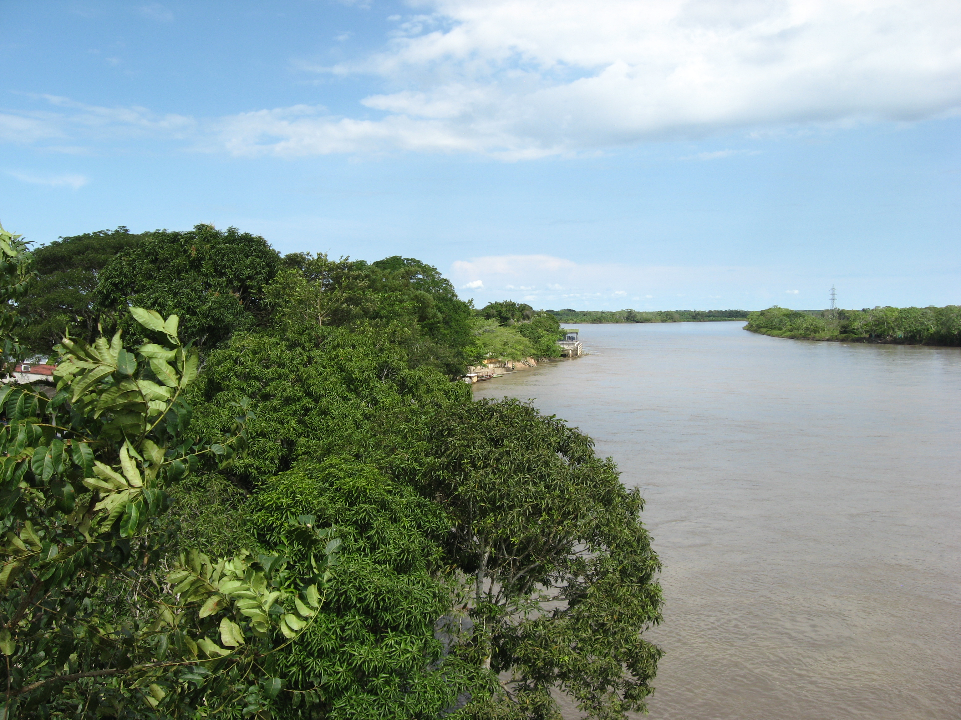 Panorámica del río meta, municipio de Cabuyaro Esta fotografía fue tomada en el municipio colombiano con código 50124.